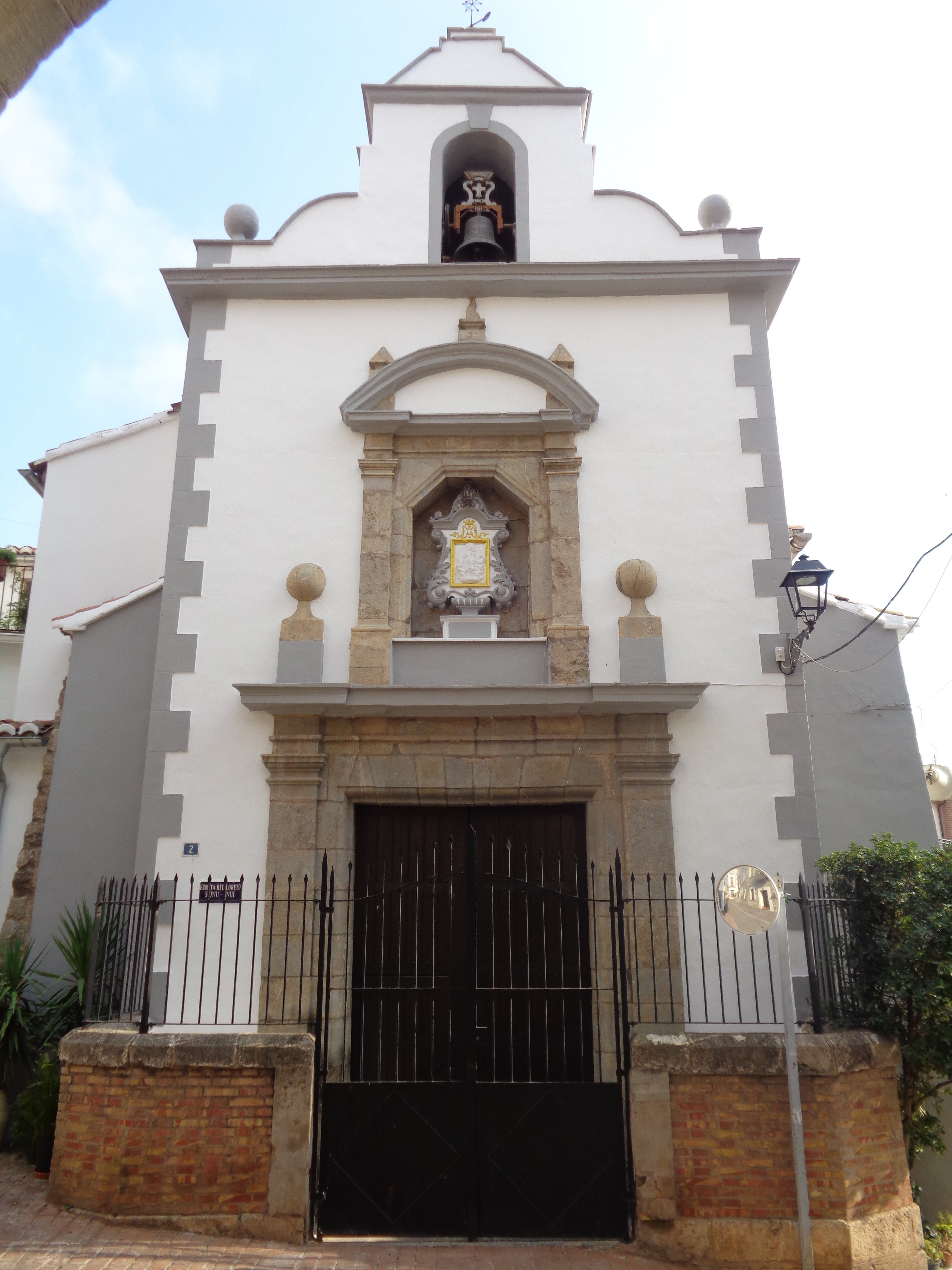 Begís. 07.022-002.